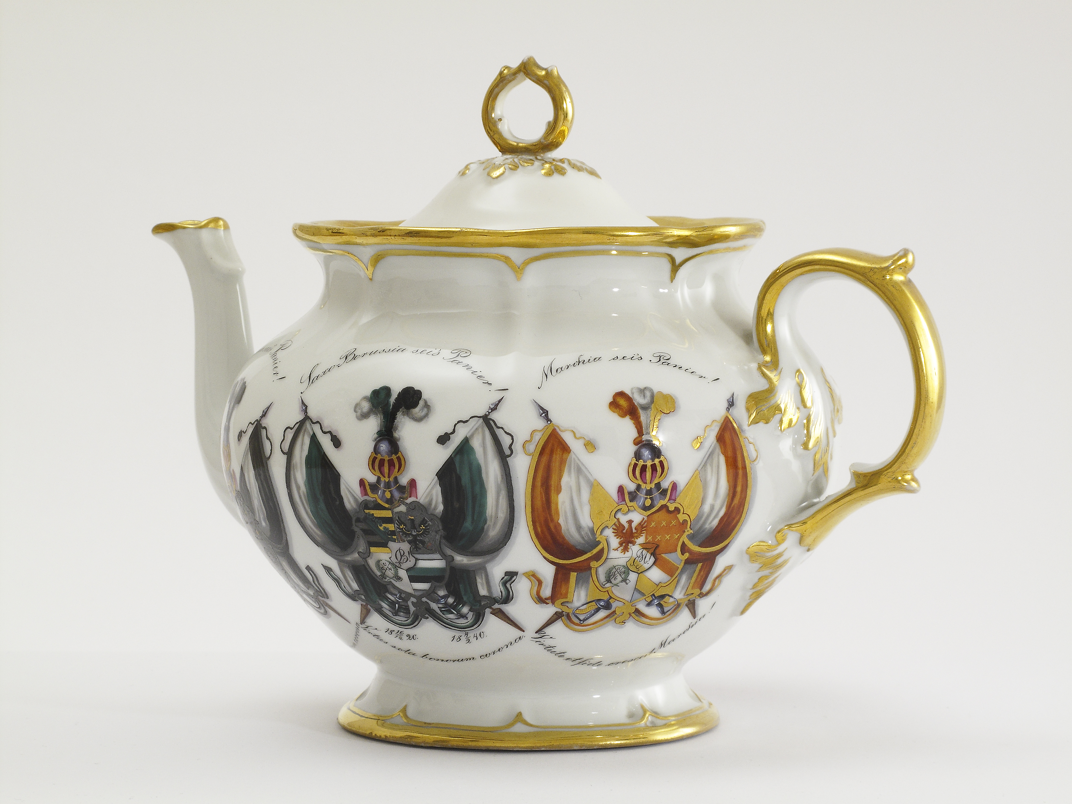 Porzellankanne mit den Wappen der Corps Saxo-Borussia Heidelberg und Marchia Breslau (vor 1860)